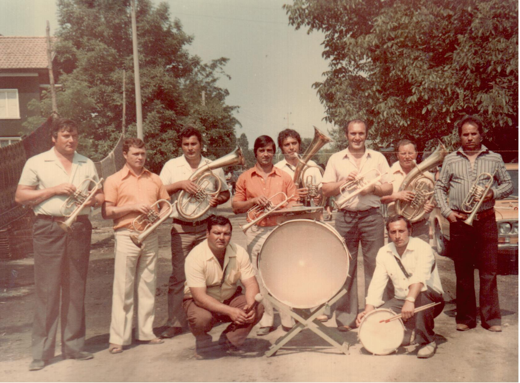 Духов оркестър на с.Неговановци